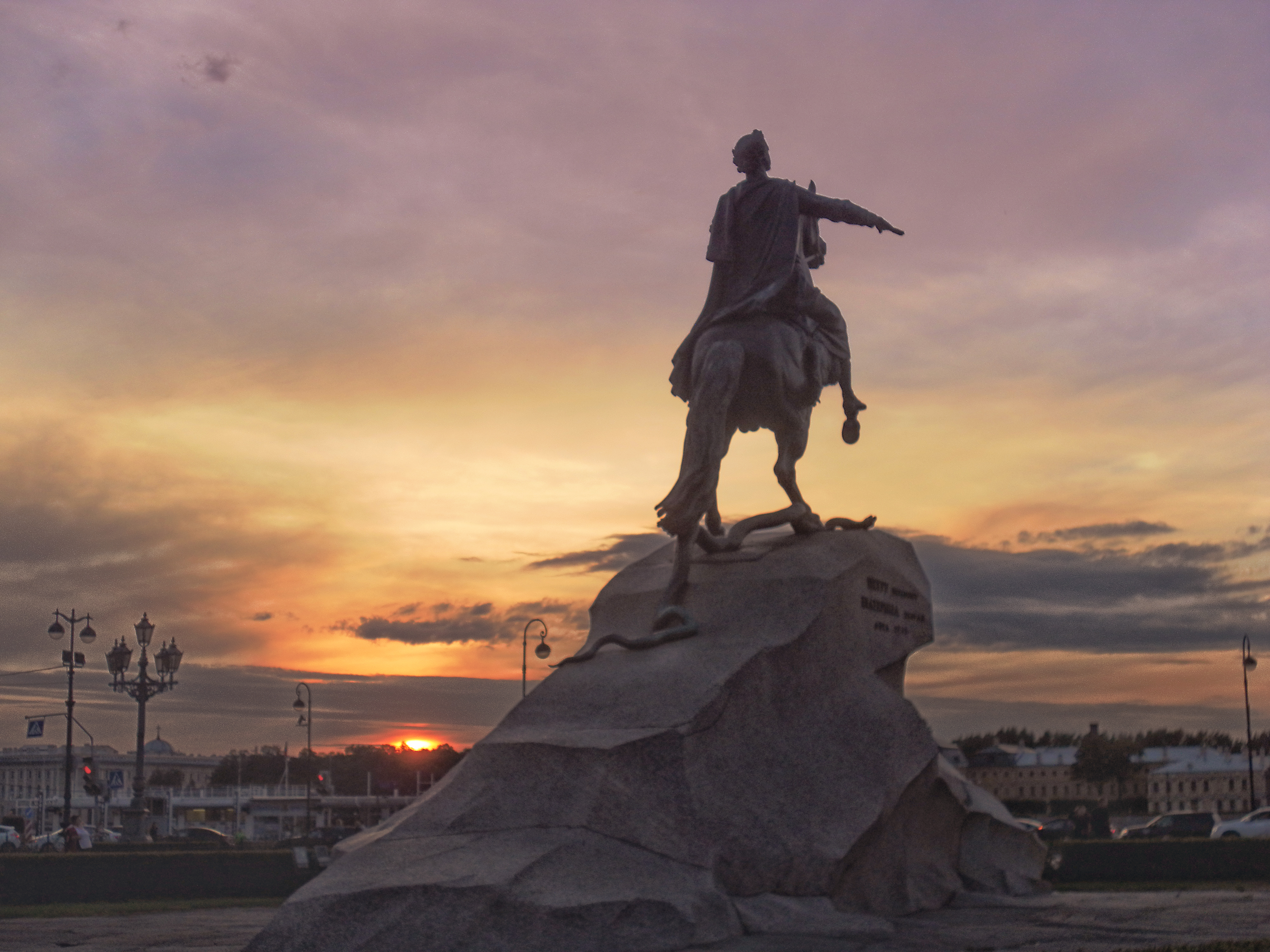 Адмиралтейский бульвар (Санкт-Петербург и Лен.область, Санкт-Петербург, адмиралтейская наб.)